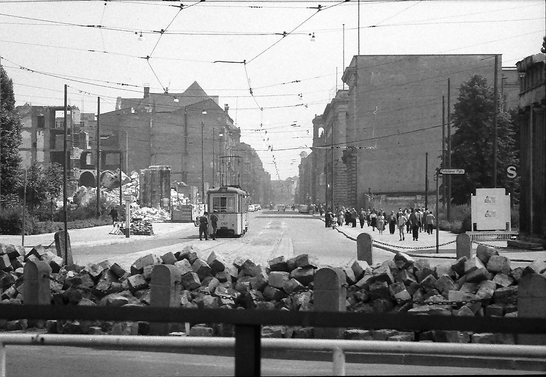 Potsdamer Platz in Berlin, Blick über den Leipziger Platz in die Leipziger Straße (Berlin).